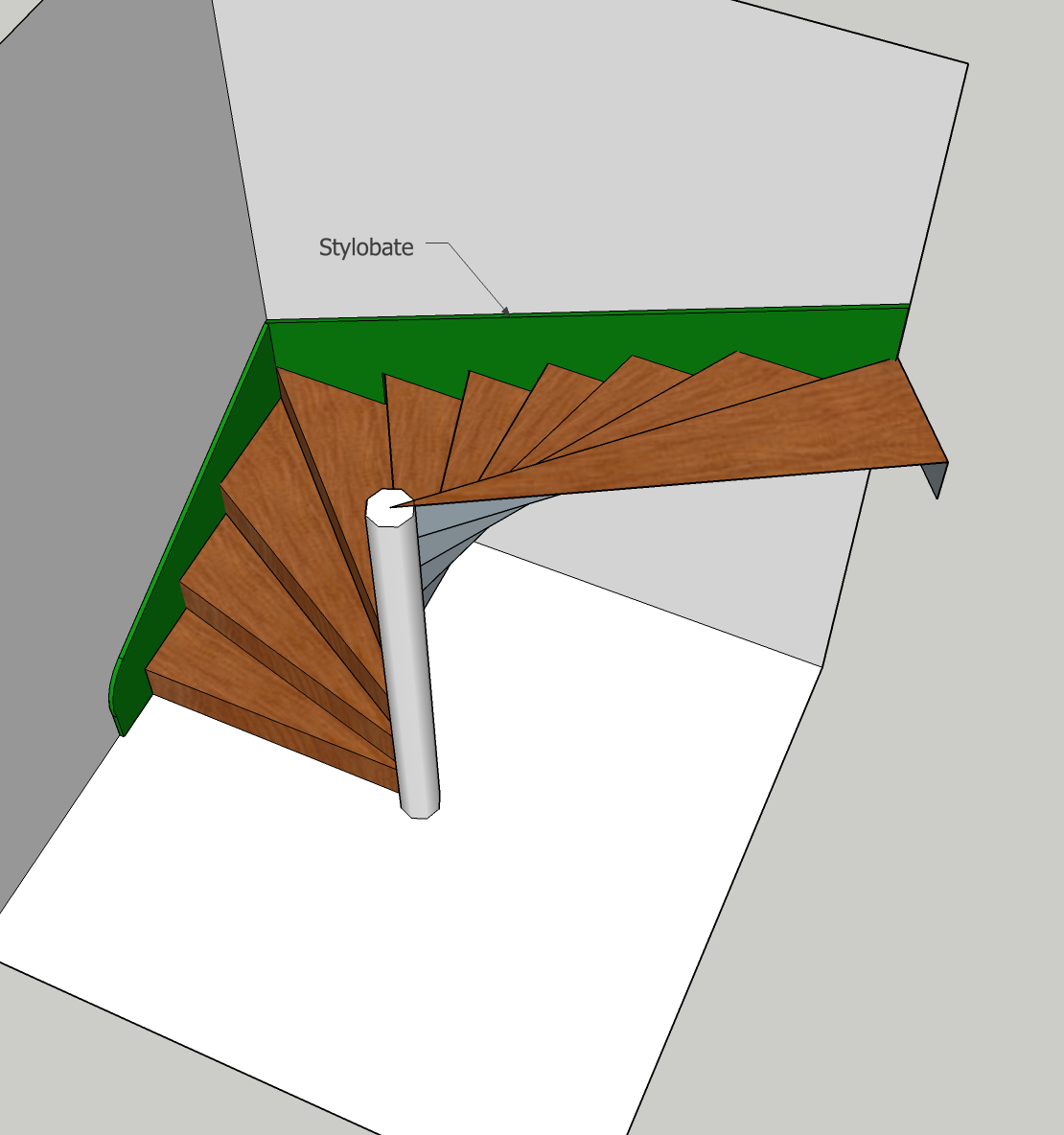 Modèle 3d figurant un escalier dans l'angle de deux murs et le stylobate